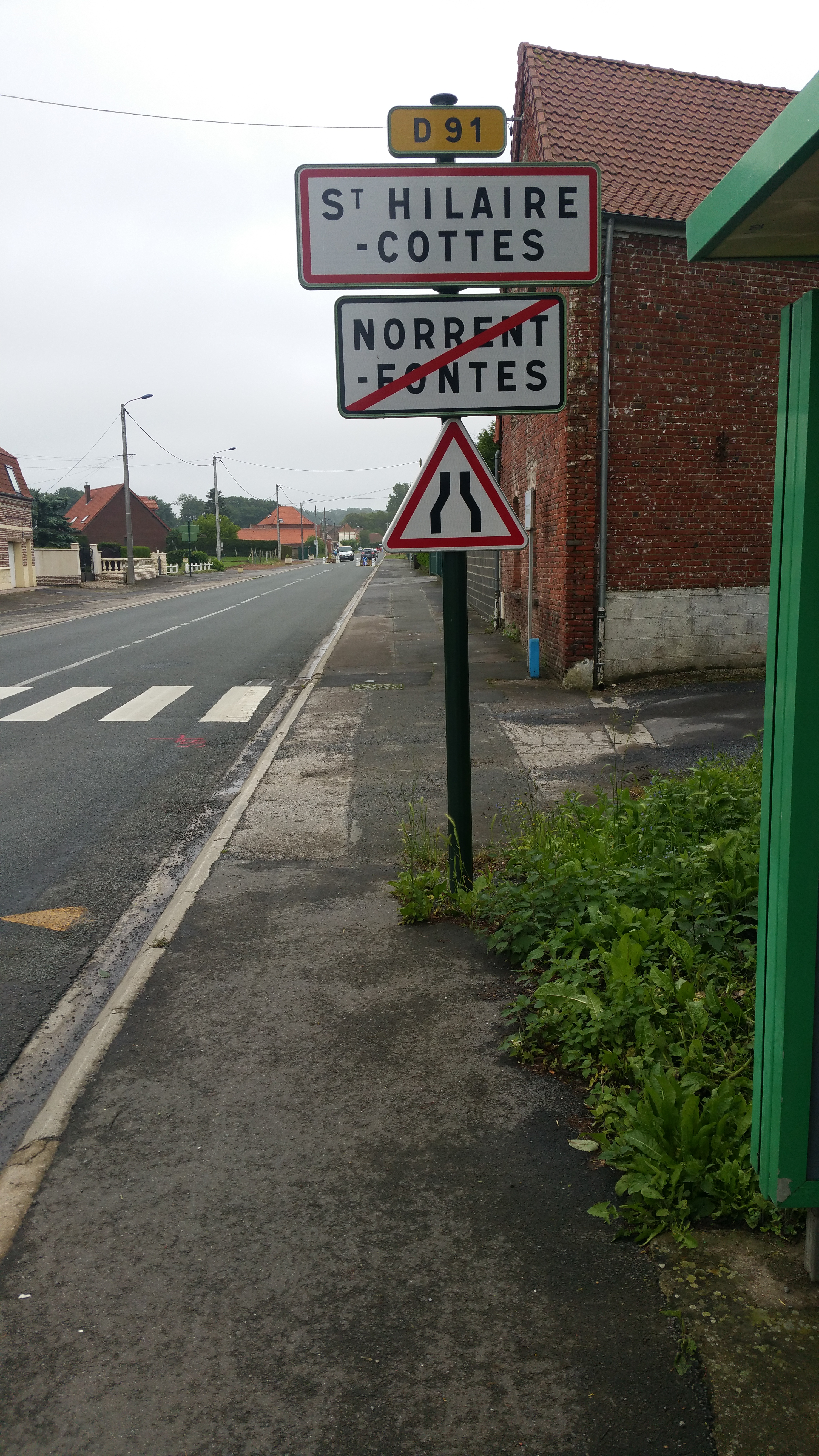 Vue d'une entrée de Saint-Hilaire-Cottes en sortie de Norrent-Fontes.